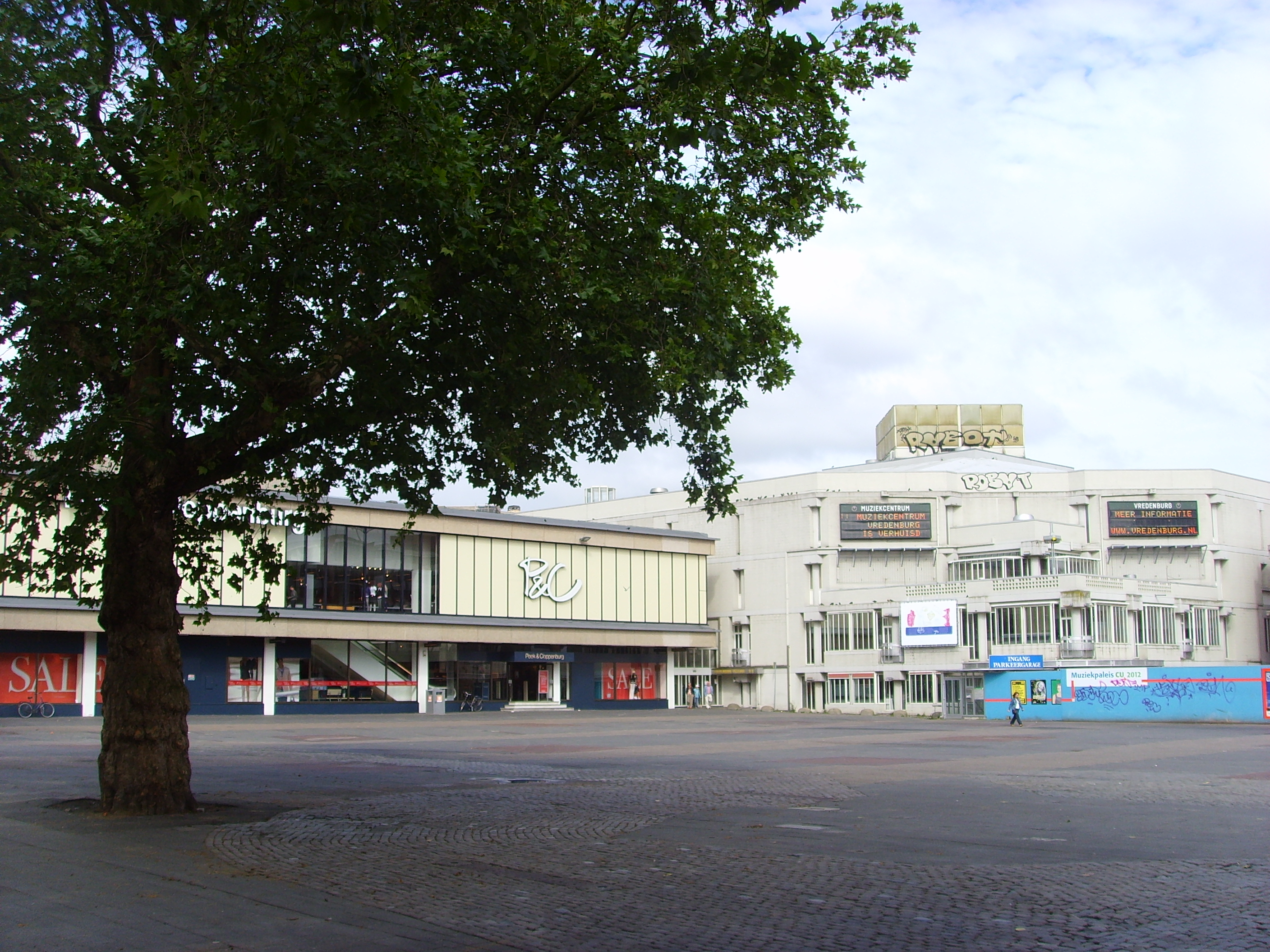 Het Vredenburgplein in de binnenstad van Utrecht, met op de achtergrond Hoog Catharijne en het oude Muziekcentrum Vredenburg